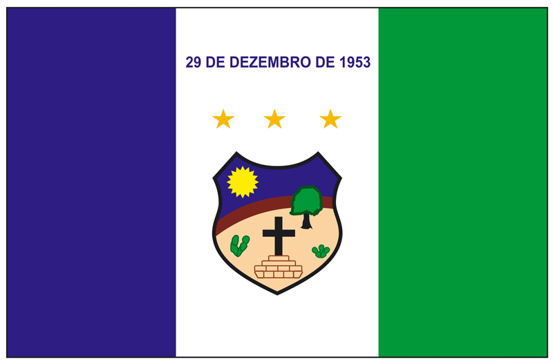 Bandeira de Santa Cruz do Capibaribe-PE